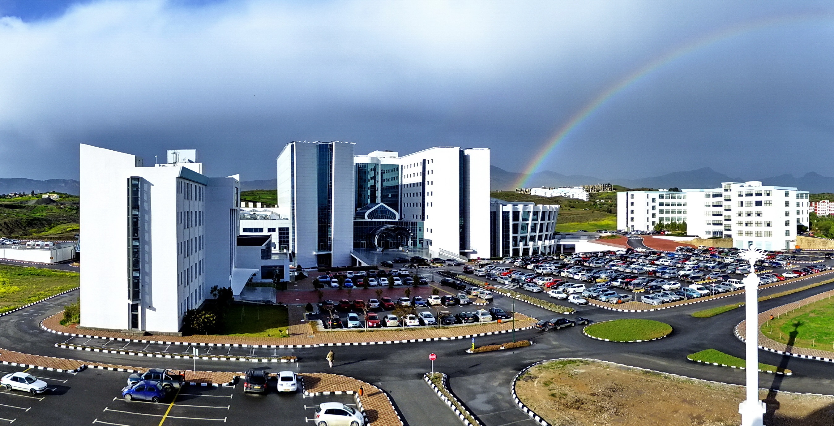 Yakın Doğu Üniversitesi Hastanesi.